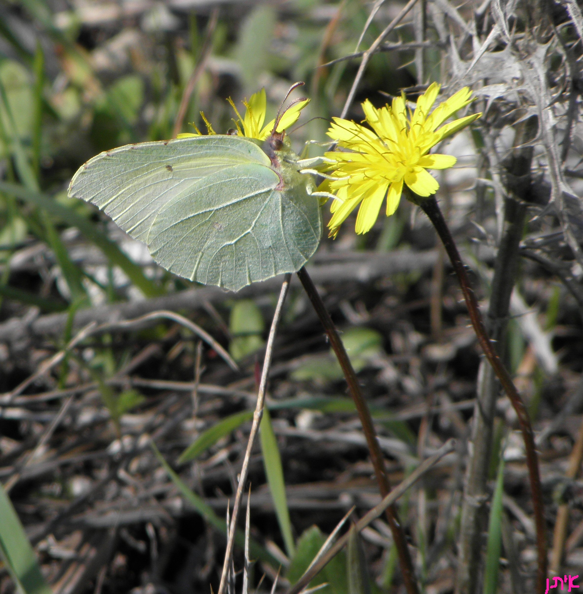 Gonepteryx cleopatra on Leontodon tuberosus (Thrincia tuberosa) לבנין לימוני על כתמה עבת שורשים